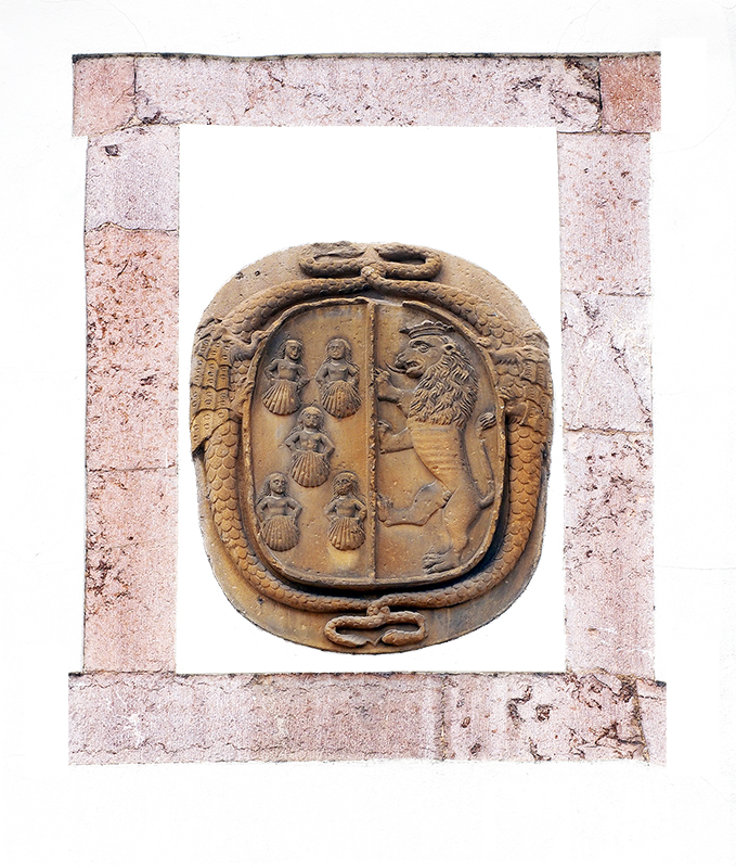 Luis. M. Lafuente